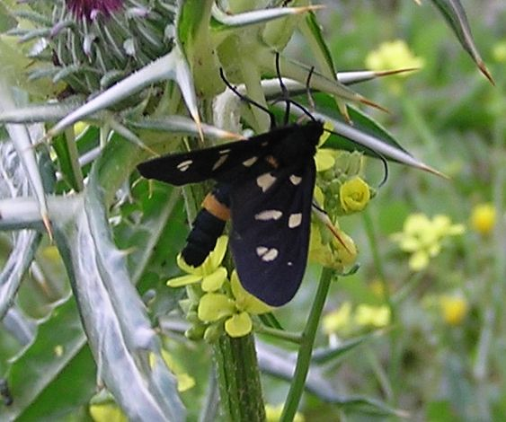 Amata mestralii, taken on the Gilboa mountain, Israel